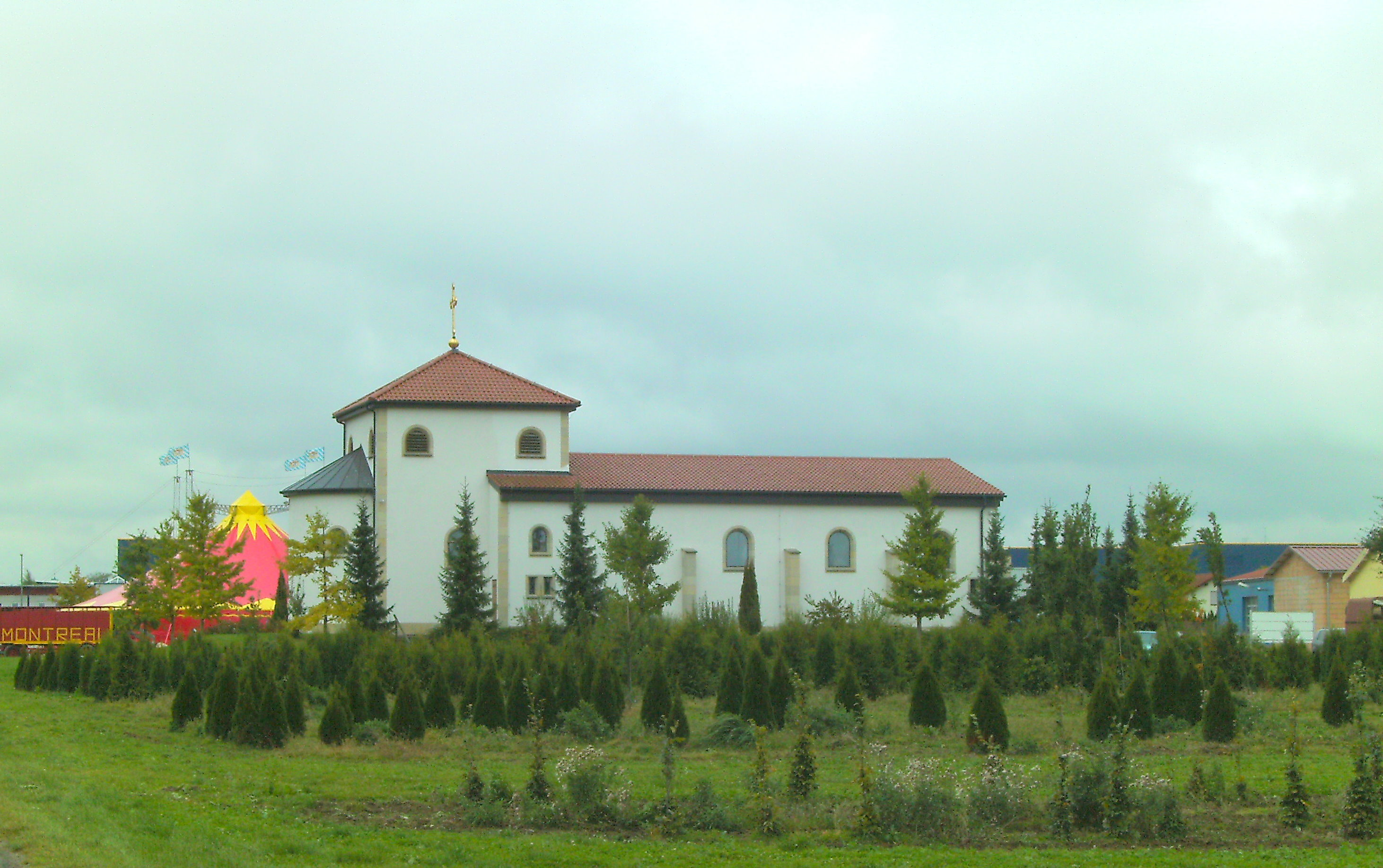 Piusbruderschaftskirche St. Josef in Memmingen - Hinten Kinderzirkuszelt